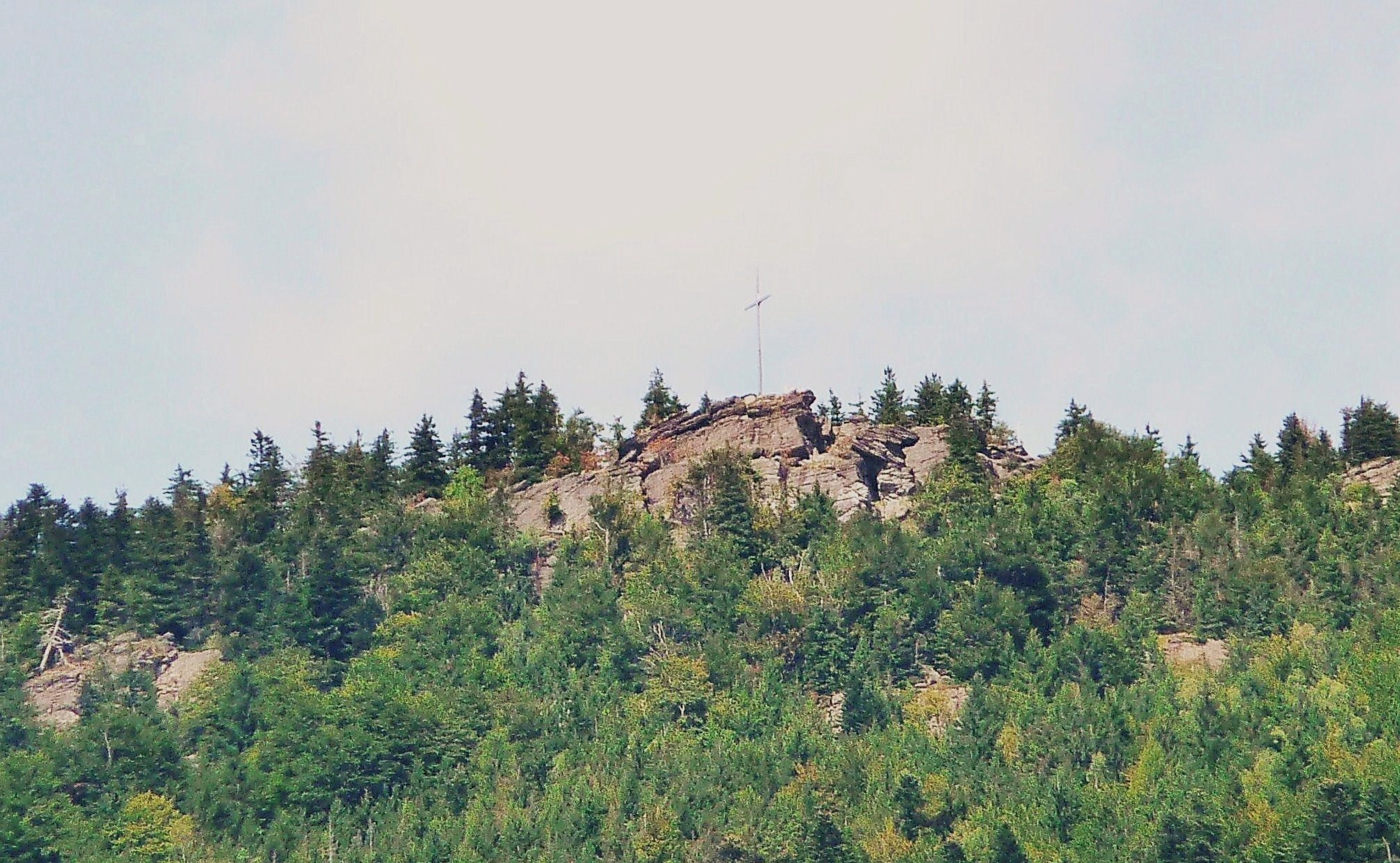 Der Gipfel des Kreuzfelsens aus südlicher Richtung